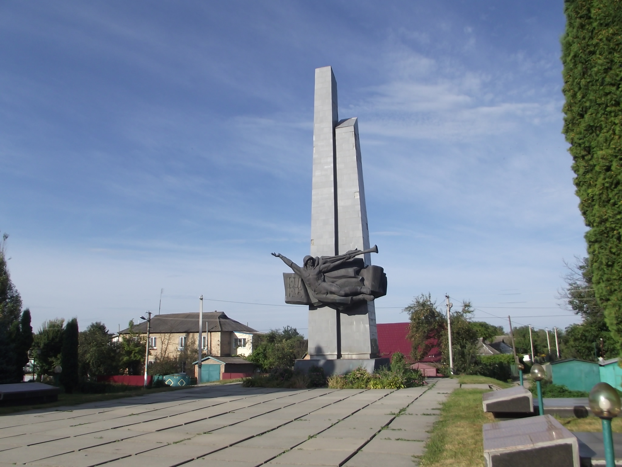 Братська могила воїнів Радянської Армії, які загинули при звільненні міста, підпільників, громадян, розстріляних в період окупації, Миронівка, вул. Леніна, парк